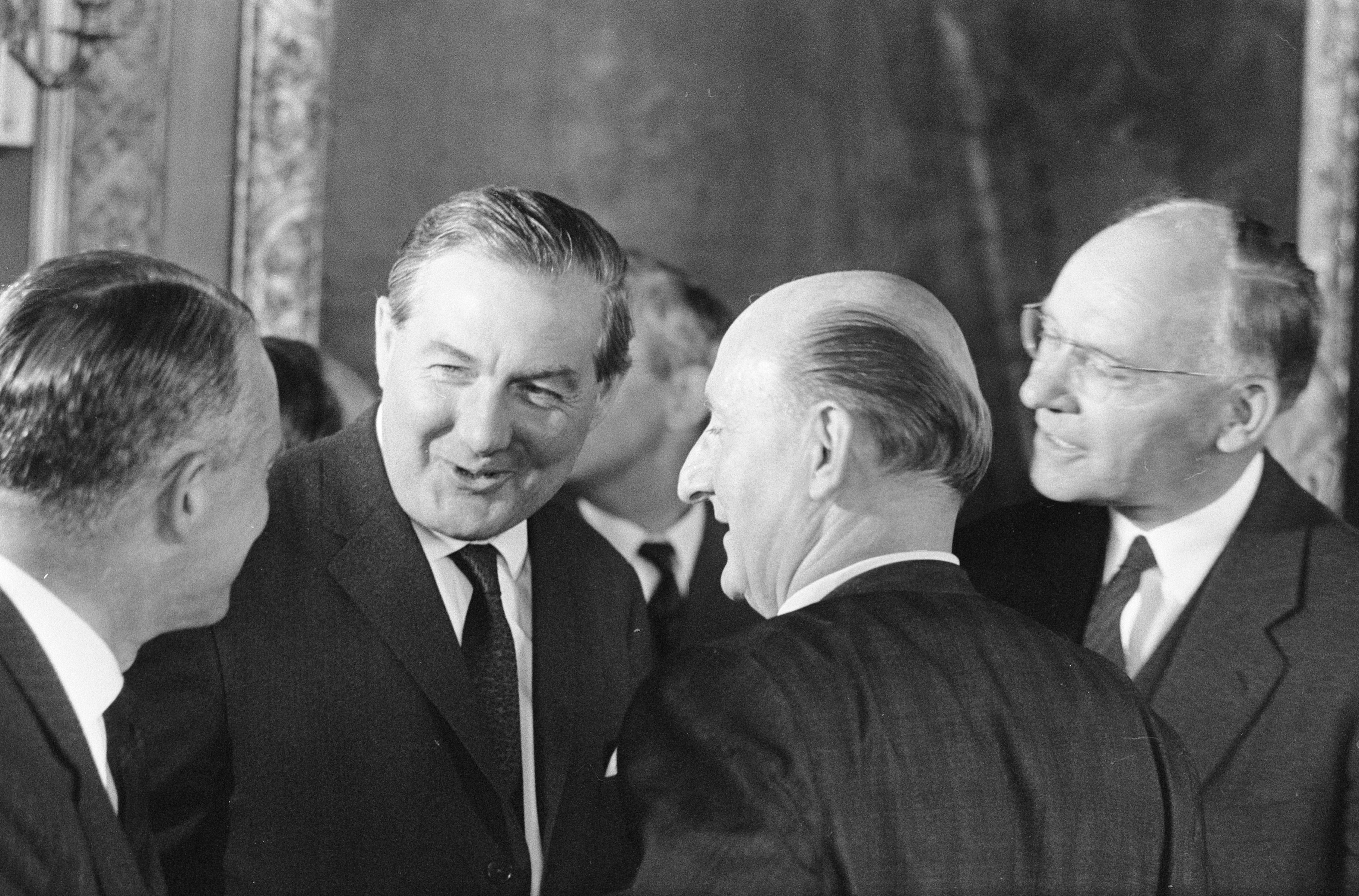 Collectie / Archief : Fotocollectie Anefo Reportage / Serie : [ onbekend ] Beschrijving : Groep van tien Ministers van Financien bijeen in Den Haag , Minister Vondeling (rechts) en Minister Callaghan (tweede links) in gesprek Datum : 25 juli 1966 Locatie : Den Haag, Zuid-Holland Trefwoorden : gesprekken, ministers Persoonsnaam : Ministers van Financien, Vondeling, Anne Fotograaf : Kroon, Ron / Anefo Auteursrechthebbende : Nationaal Archief Materiaalsoort : Negatief (zwart/wit) Nummer archiefinventaris : bekijk toegang 2.24.01.05 Bestanddeelnummer : 919-3915